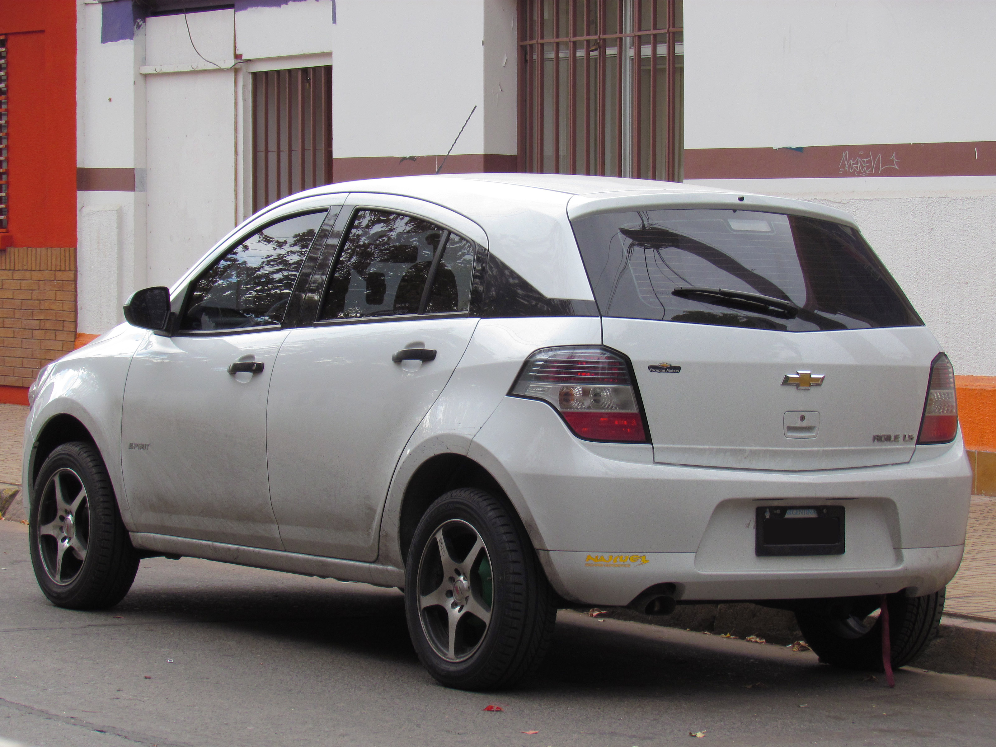 Chevrolet Agile 1.4 LS Spirit 2012